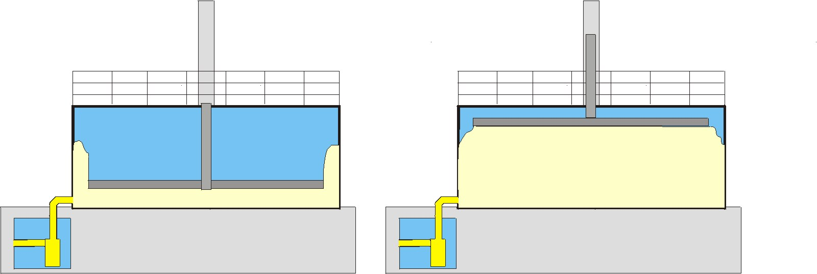 Stahlummantelter Membrangasbehälter